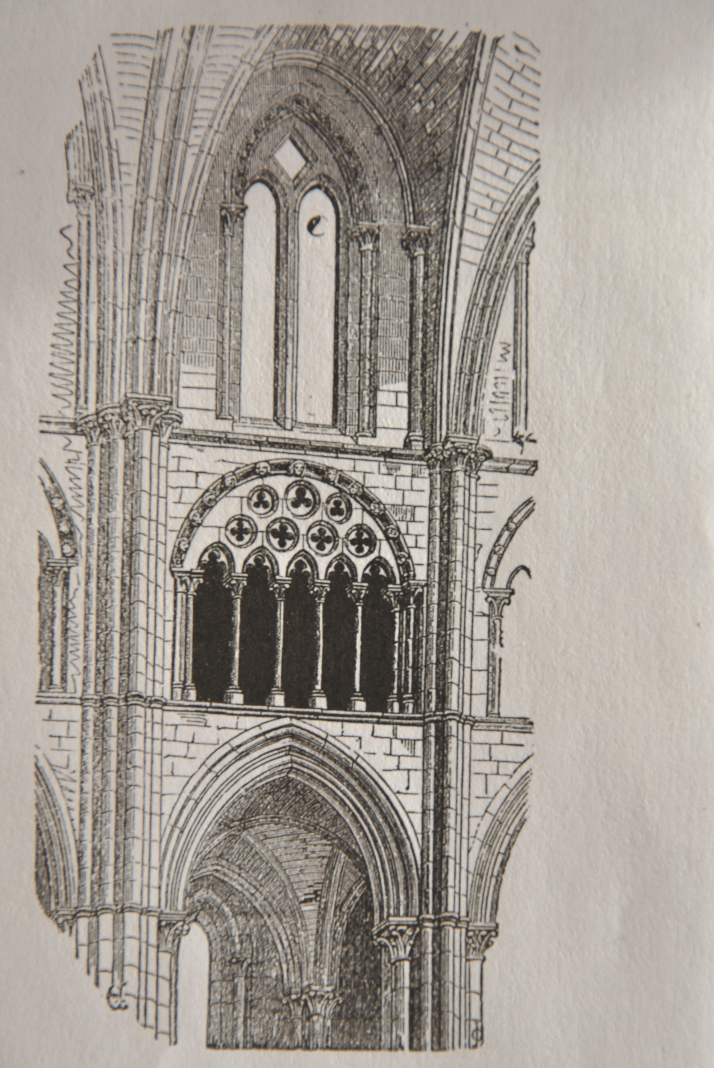 Dibujo realizado por GE Street y publicado en "La arquitectura gótica en España" Madrid 1926,tal y como él creía era el Triforio de la Catedral de Burgos antes de la intervención de Juan de Colonia